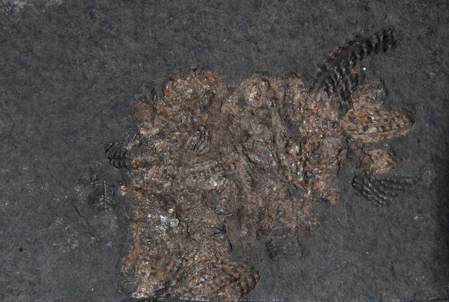 Naturhistorisches Museum Wien